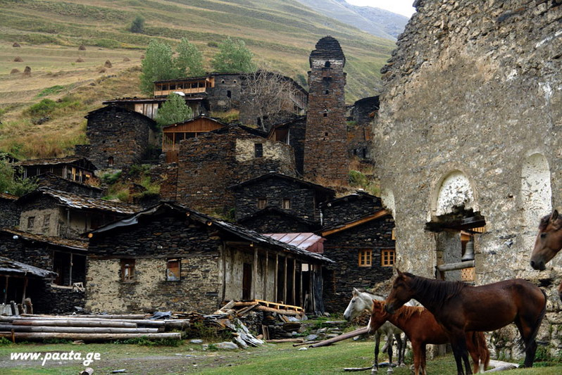 Dartlo (დართლო), Tusheti Georgia